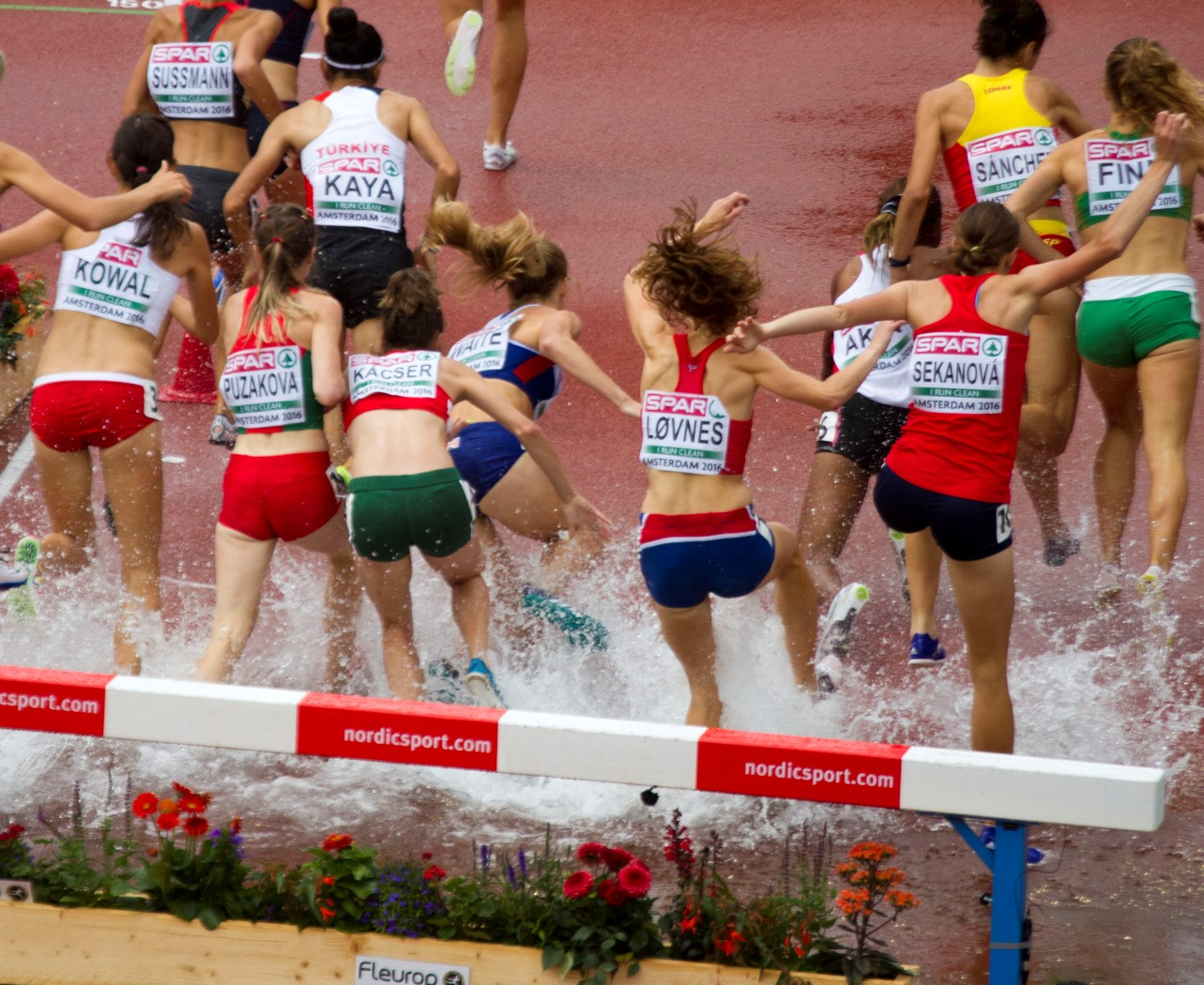 5019 reeksen 3000mST dames